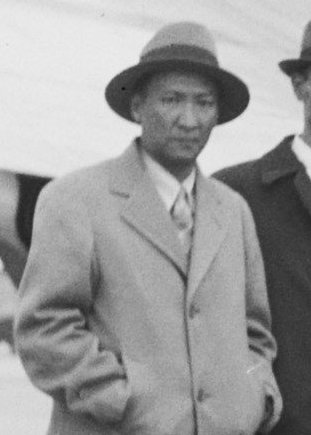 Collectie / Archief: Fotocollectie Anefo Reportage / Serie: [onbekend] Beschrijving: Aankomst West Indische delegatie Trefwoorden: AANKOMST, delegatie Auteursrechthebbende: Nationaal Archief Materiaalsoort: Negatief (zwart/wit) Nummer archiefinventaris: bekijk toegang 2.24.01.03 Bestanddeelnummer: 901-8096 V.l.n.r. van rechts naar links: F.J.G. Kwartsz, C.A. Eman, E.J. Jonkheer, dr. M.F. da Costa Gomez, W.L. Plantz (allen afkomstig van Curaçao) H. Miskin, S. Rambaran, A.M. van Eyck, J.C. Ho A Sjoe, F.H.R. Lim A Po, A.R.L. Smit (allen afkomstig uit Suriname) Plaats: Schiphol